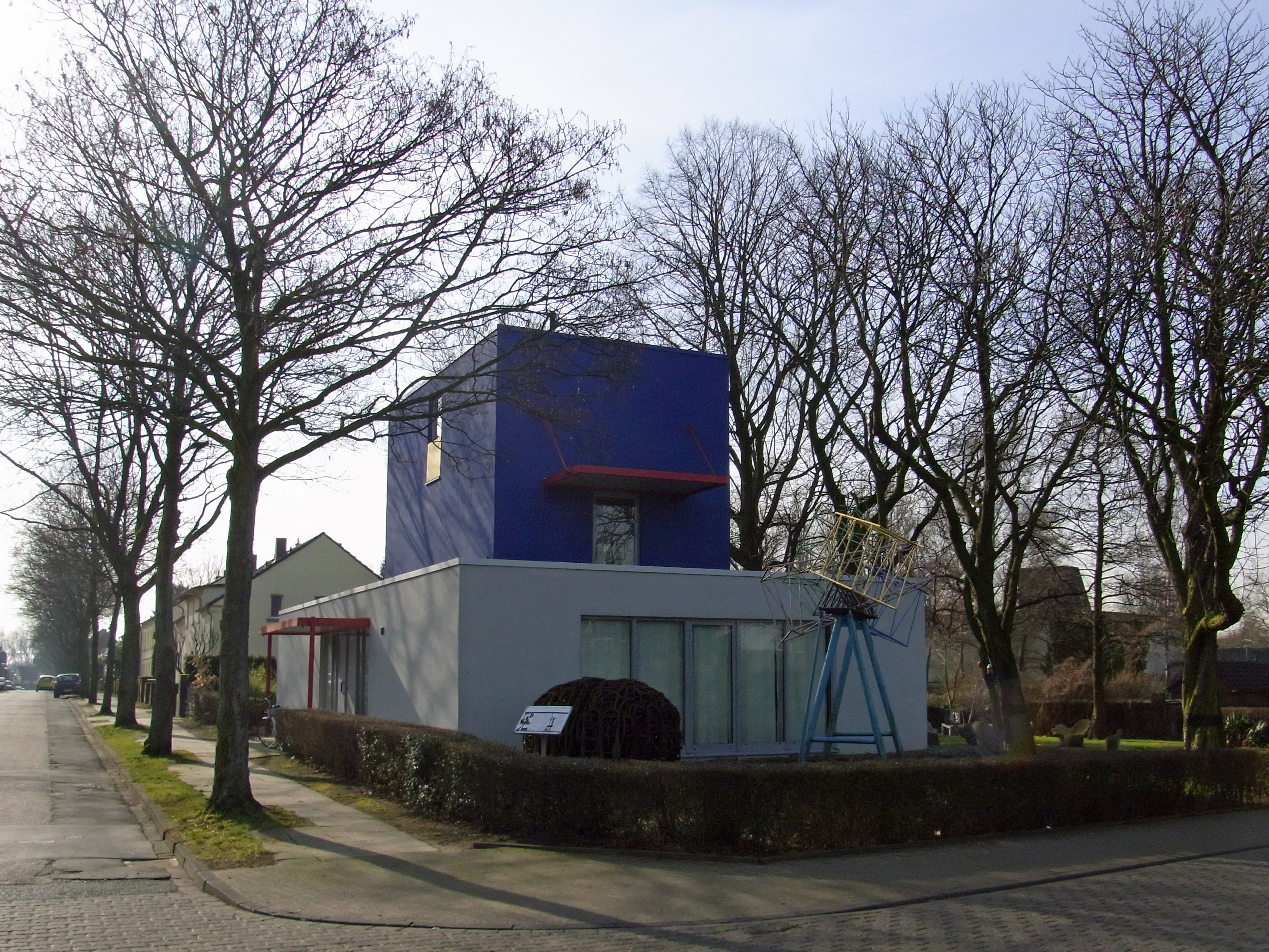 Siedlung Eisenheim